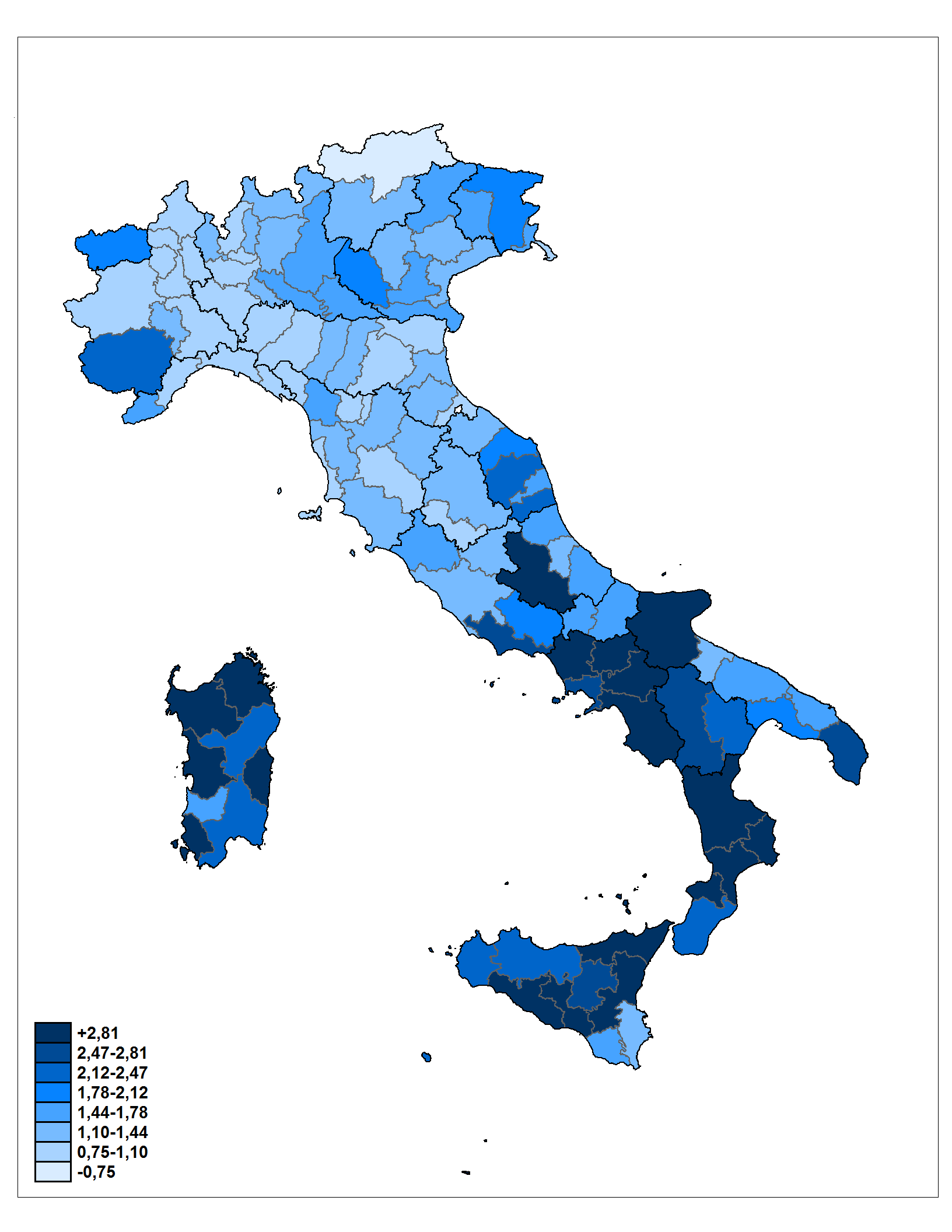 Distribuzione geografica del voto per Unione di Centro nelle elezioni politiche italiane del 2013.